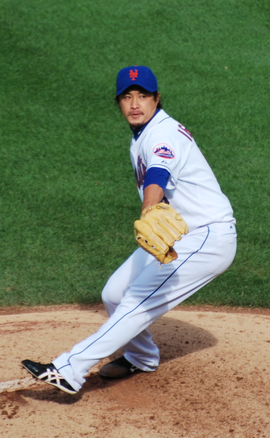 Ryota Igarashi